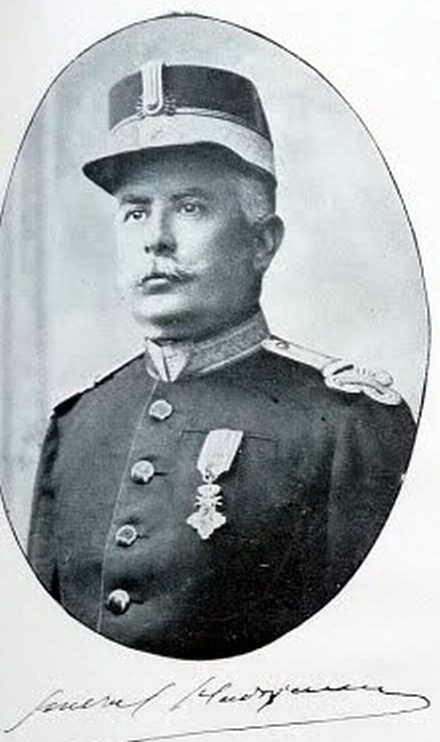 D- General Luca Vladoianu